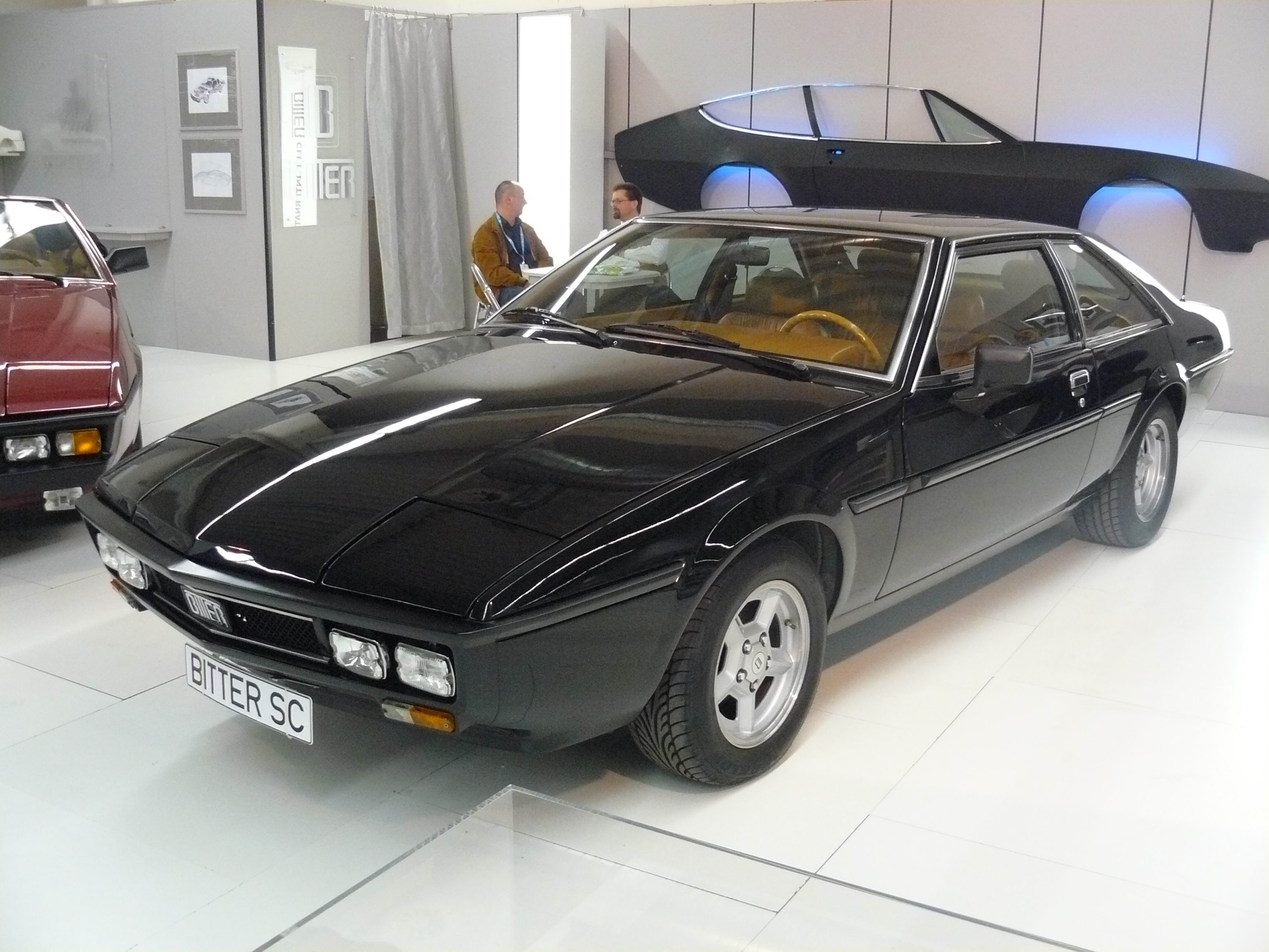 Essen 2011